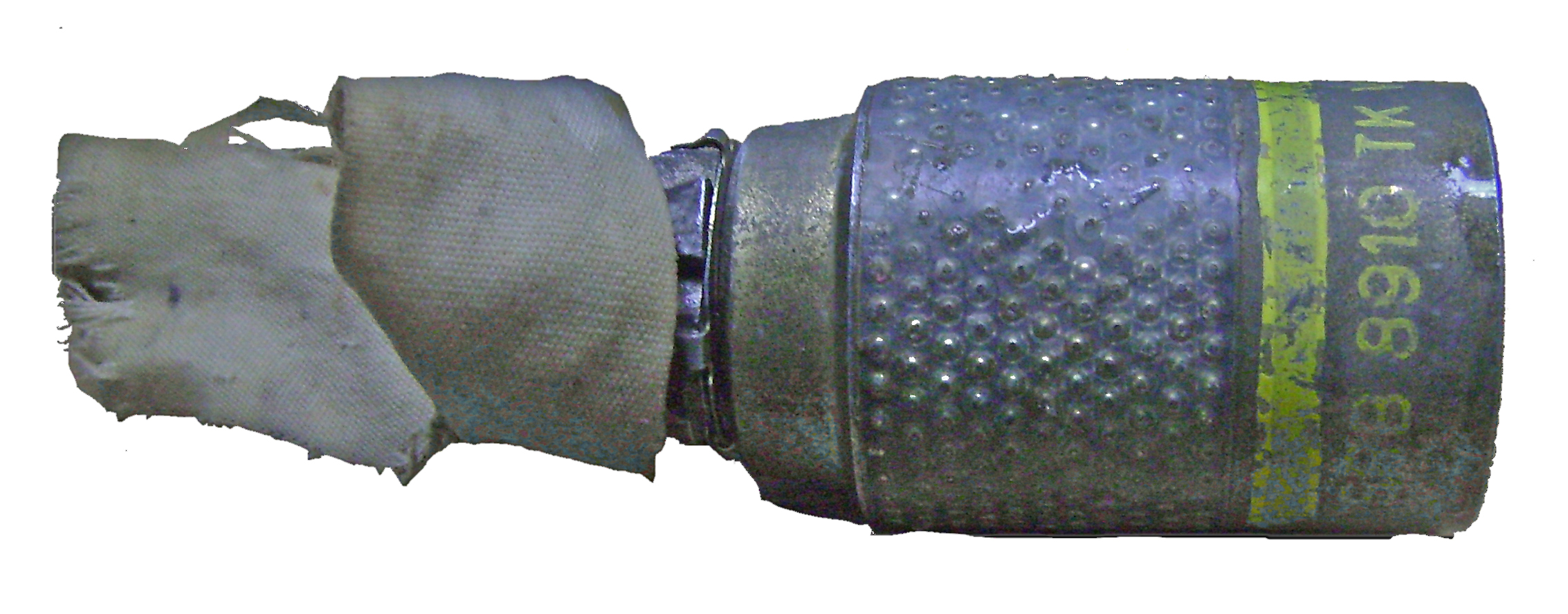 KB-1 bomblet from a Yugoslav Forces cluster strike